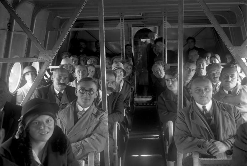 Der Weltrecordflug des Dornier-Riesenflugbootes "Do X" mit 169 Passagieren in Altenrhein a/Bodensee. Es ist das erste Mal, dass 169 Personen mit einem Luftfahrzeug befördert wurden; ausser dem mitgeführten Betriebsstoff für 1200 km. was einem Gesamtgewicht von ca. 300 Passagieren entspricht. Blick in den Passagierraum des Flugbootes "Do X" mit den Passagieren während des Recordfluges.